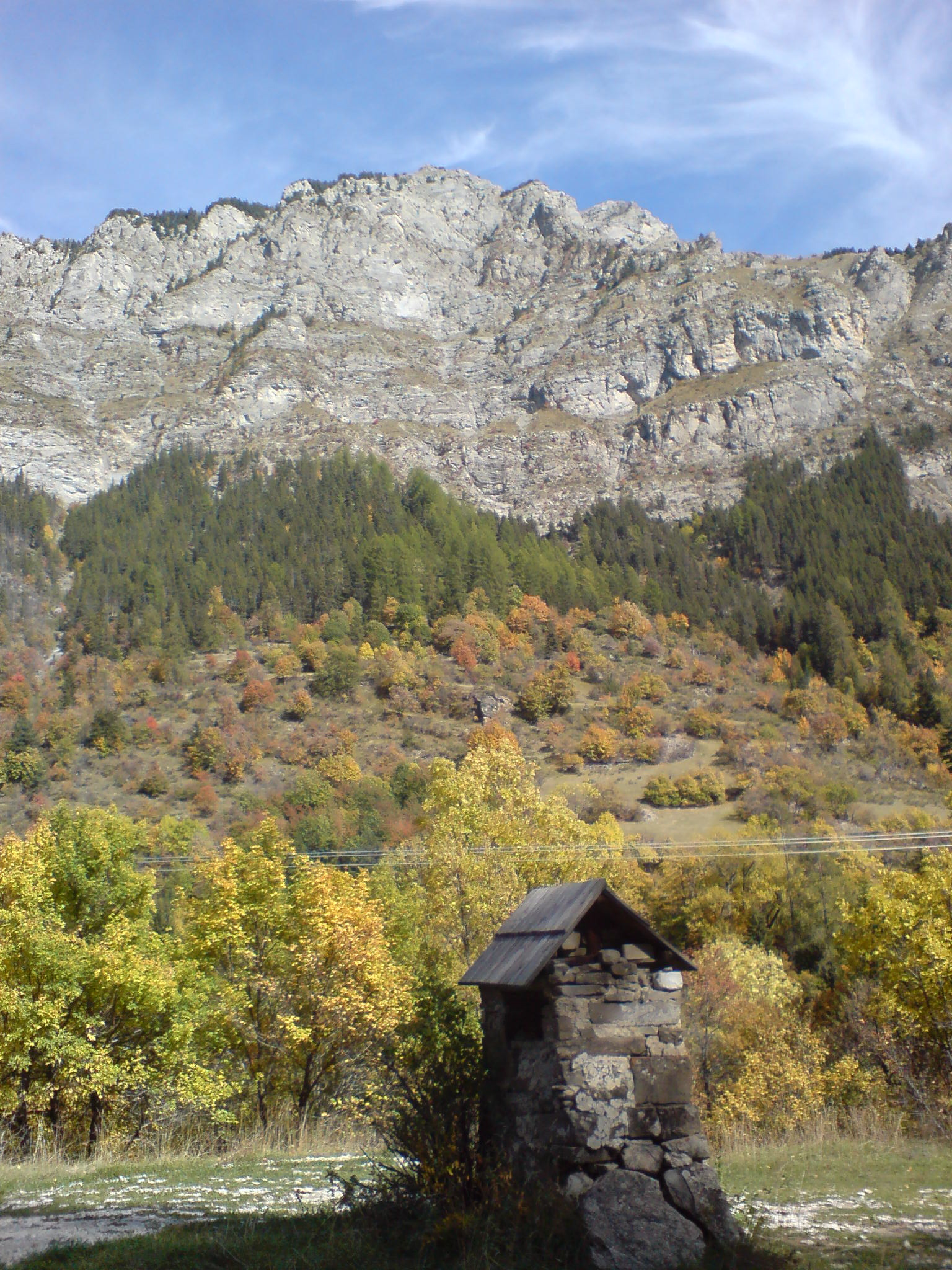 Barre de Maraval, contrefort de l’Autapie